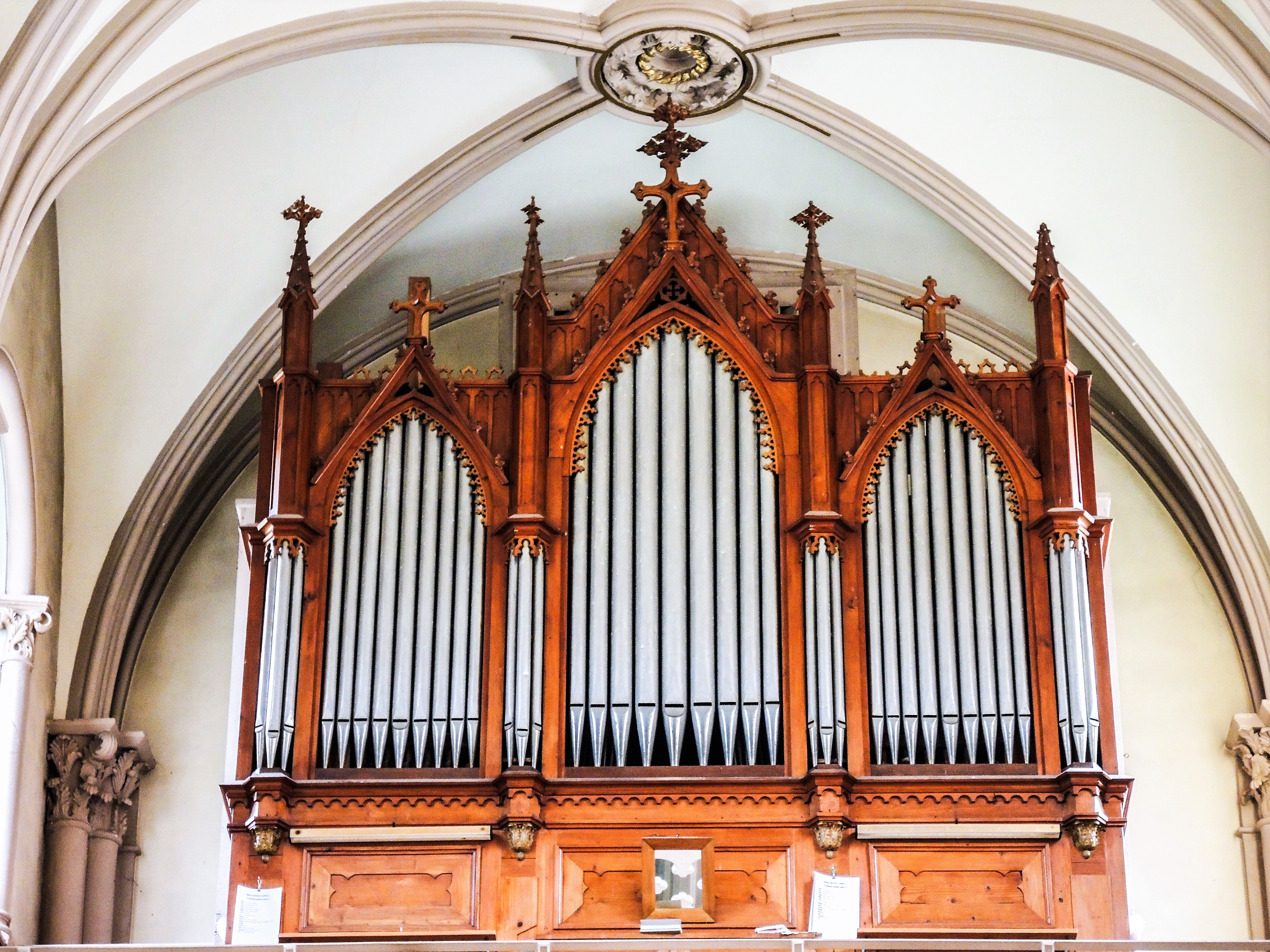 Orgue Callinet de 1851, dans l'église Saint Augustin de Rimbach-près-Masevaux